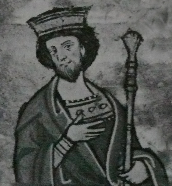 Žaltář Heřmana Durynského